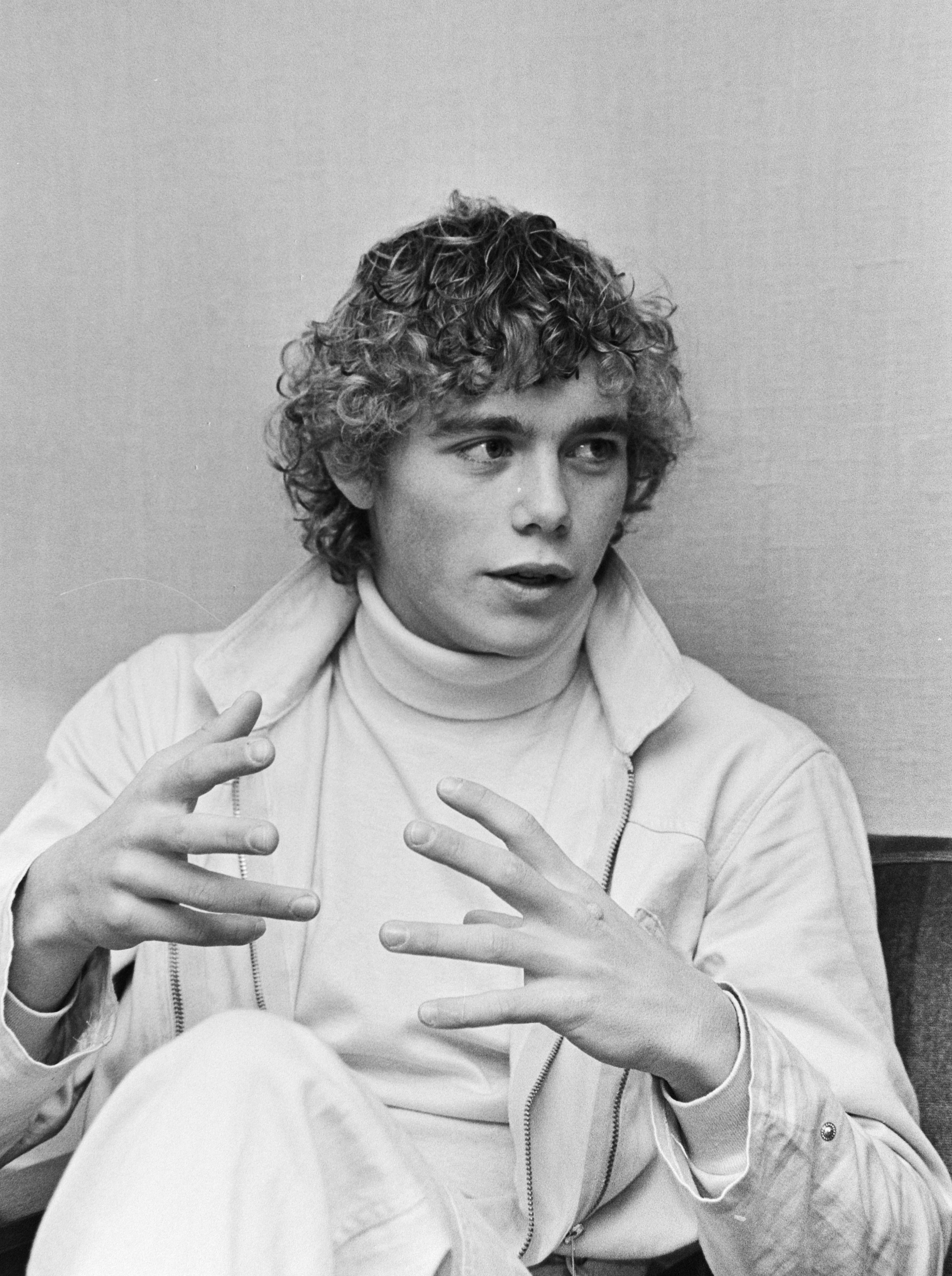 Acteur Chris Atkins zittend op een bank tijdens een interview